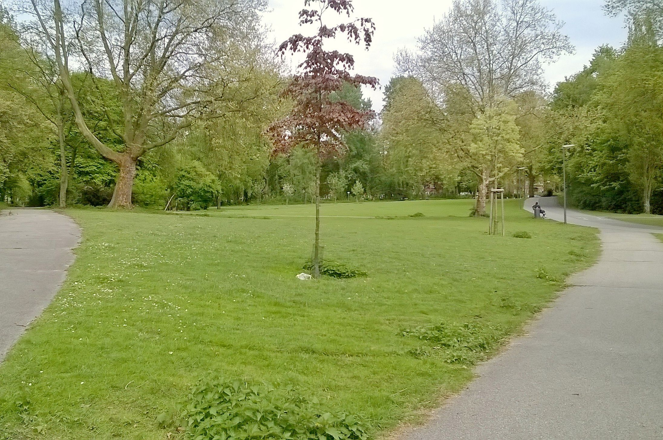 Thörls Park im Hamburger Stadtteil Hamm, Blick von Westen